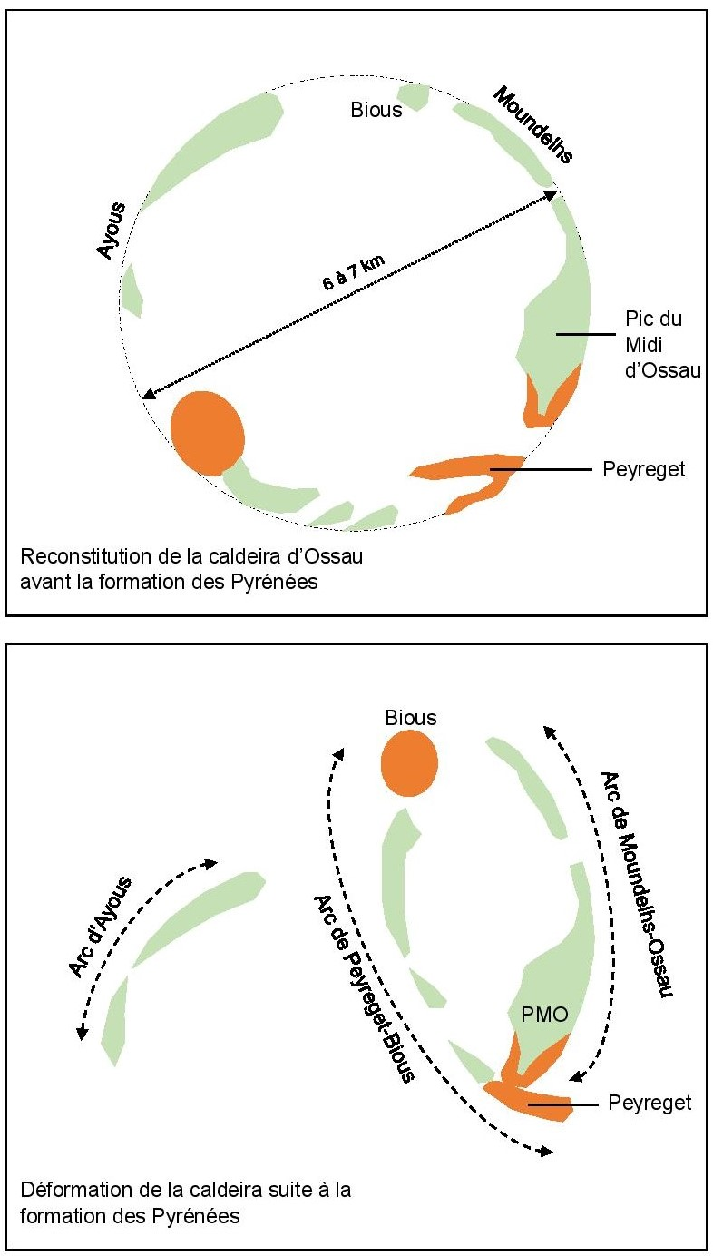 Reconstitution schématique de l'évolution du Volcan Ossau. En rouge intrusion de rhyolites et dacites, en vert intrusion d'andésites. D'après Volcanisme en Ossau par André Imbert.